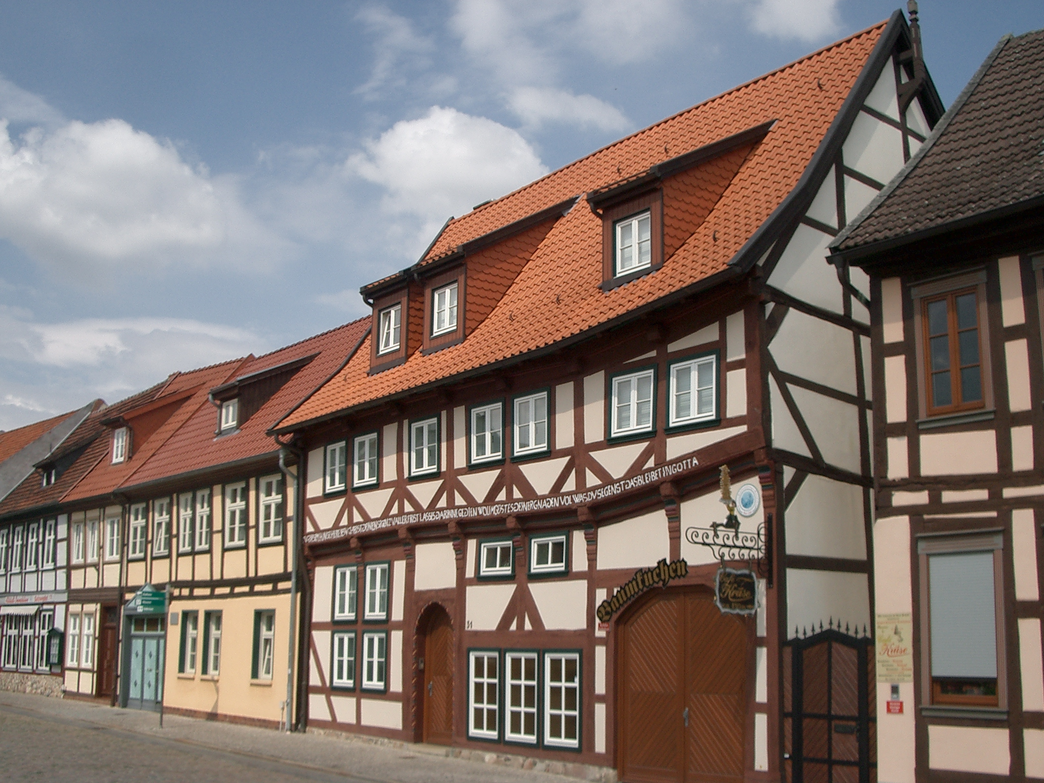 Fachwerkhäuser am Lohteich in der Salzwedeler Innenstadt